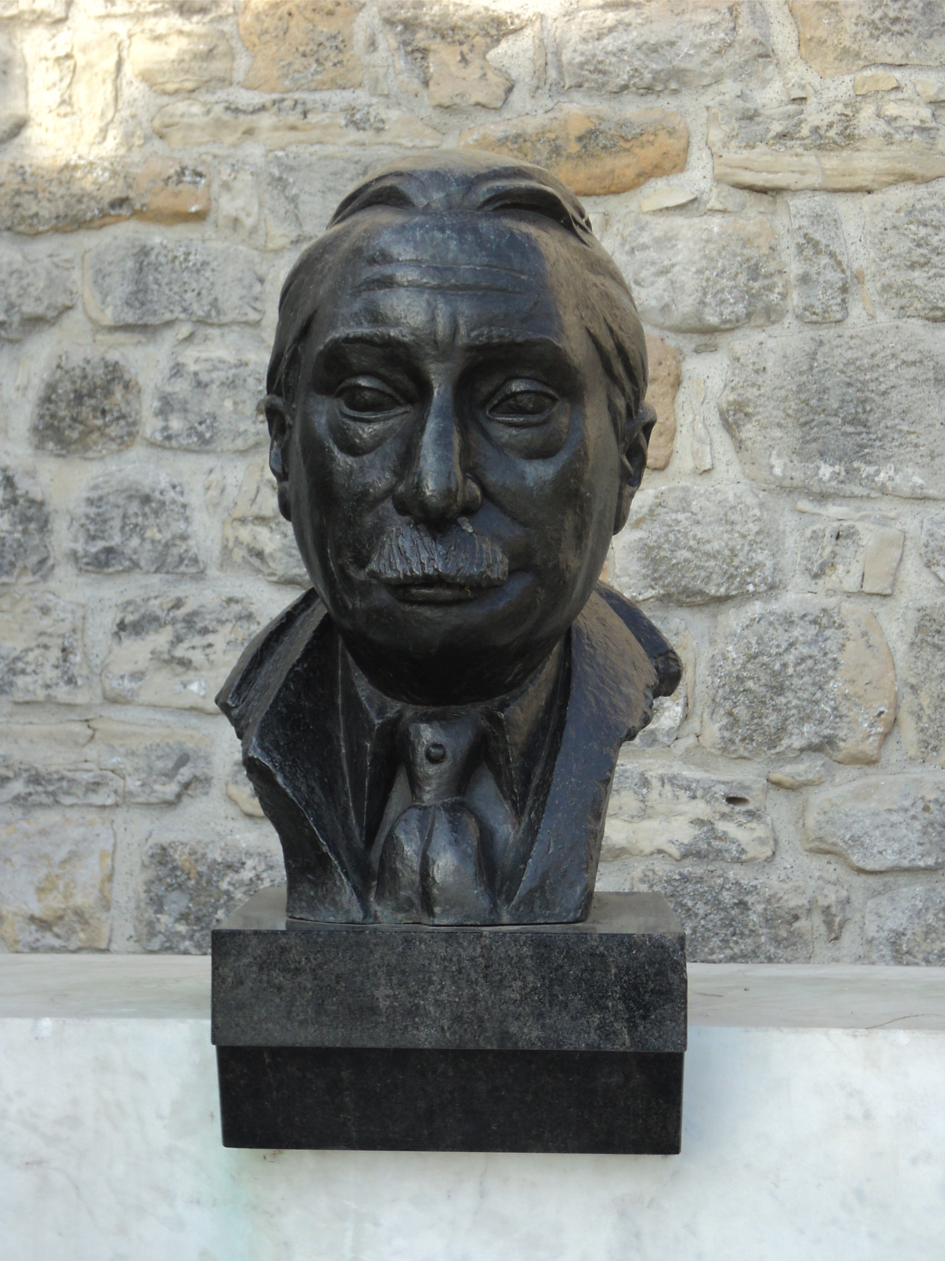 Bista Moše Pijade na Grobnici narodnih heroja na Kalemegdanu. Self-made. Maj 2011.